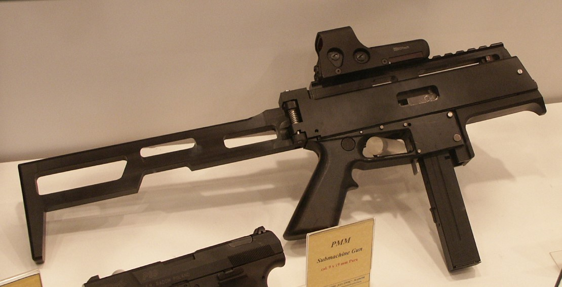 Polish prototype SMG Pistolet Maszynowy Modułowy PMM (Modular Submachine Gun)